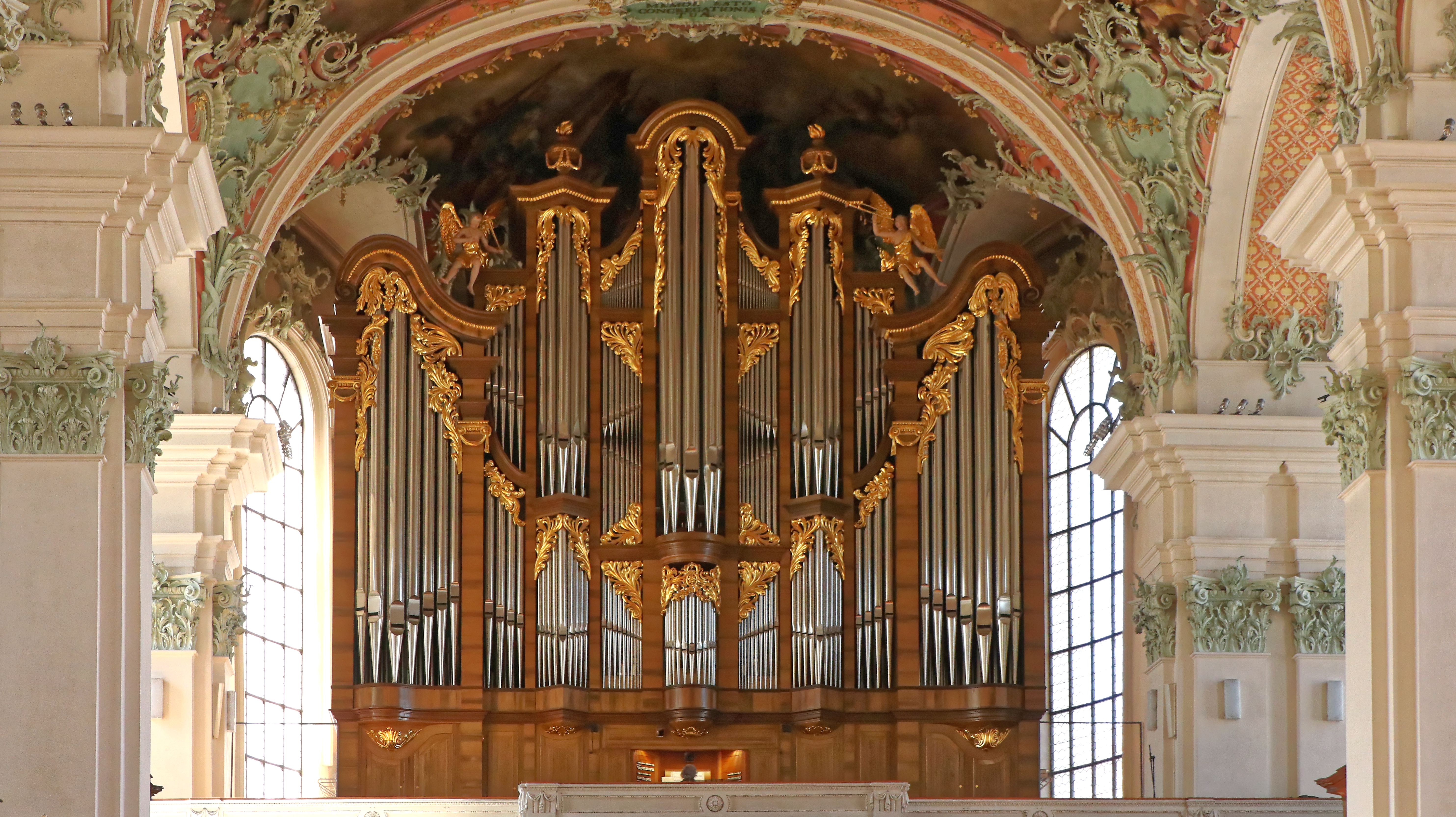 Stiftskirche innen